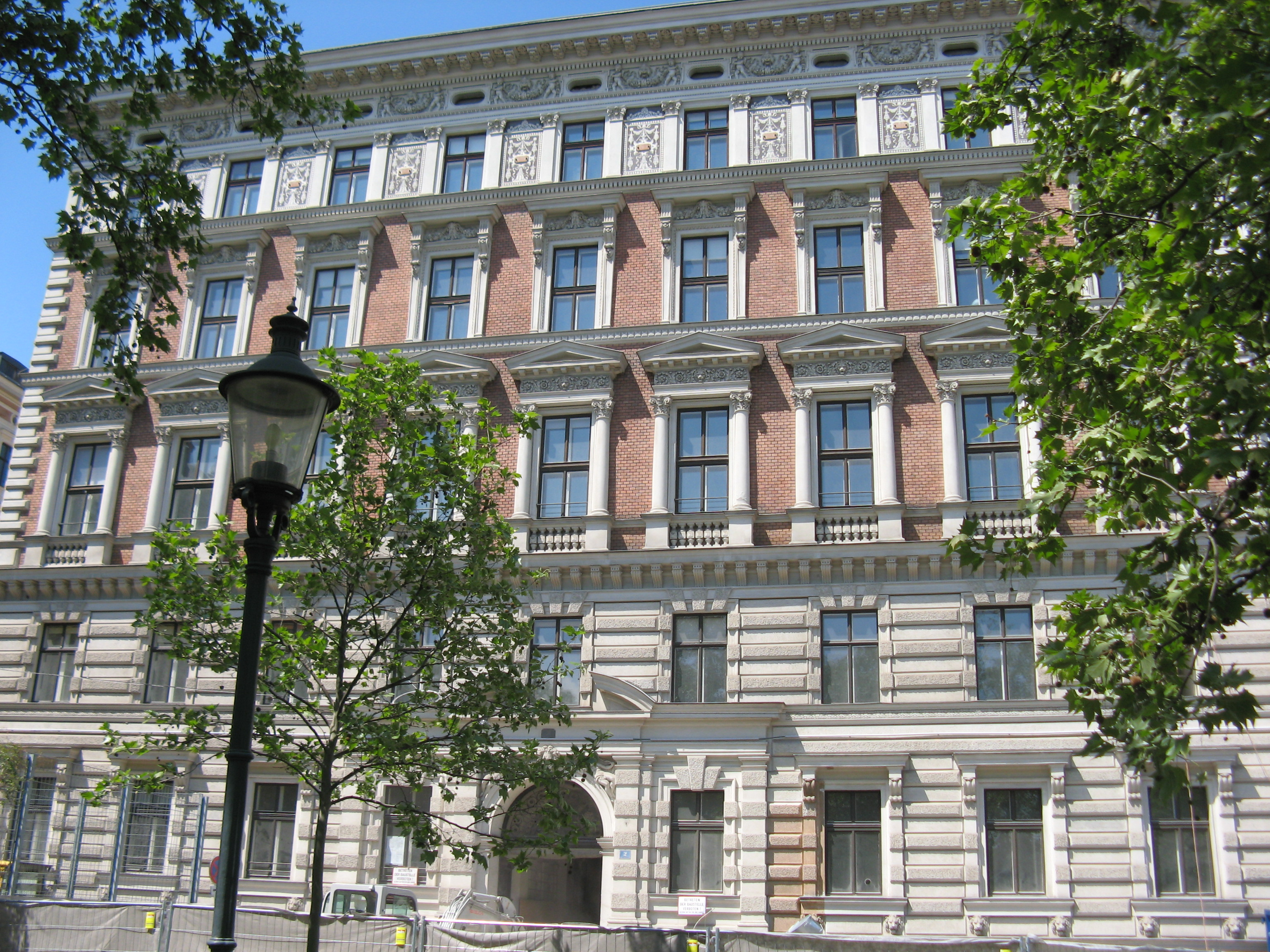 Haus Beethovenplatz 2 (1868/69) von Friedrich Schachner in Wien